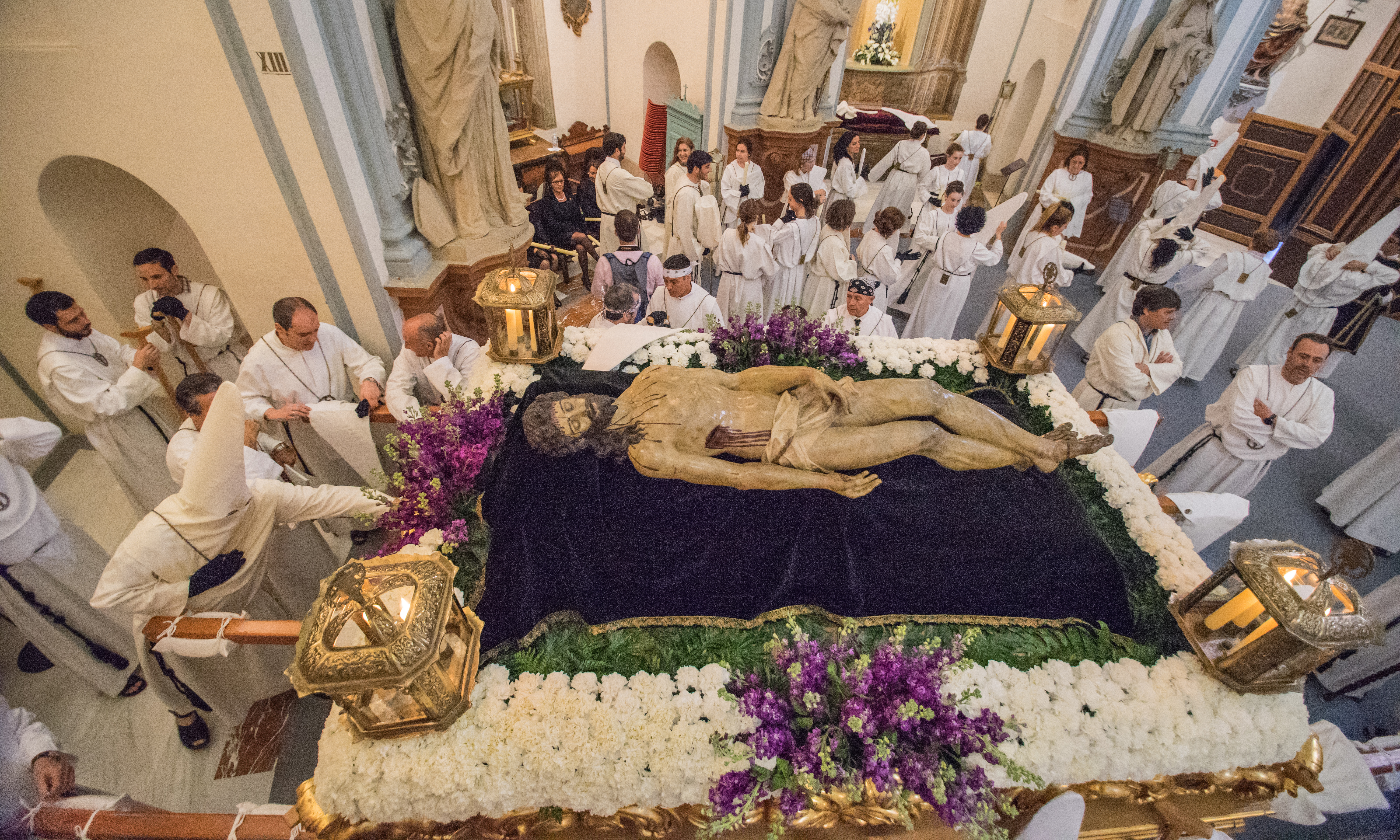 Cofradía del Yacente. Cristo Yacente en San Juan de Dios This is a photography of a Folklore festival in Spain (Wikidata id Q5685566).